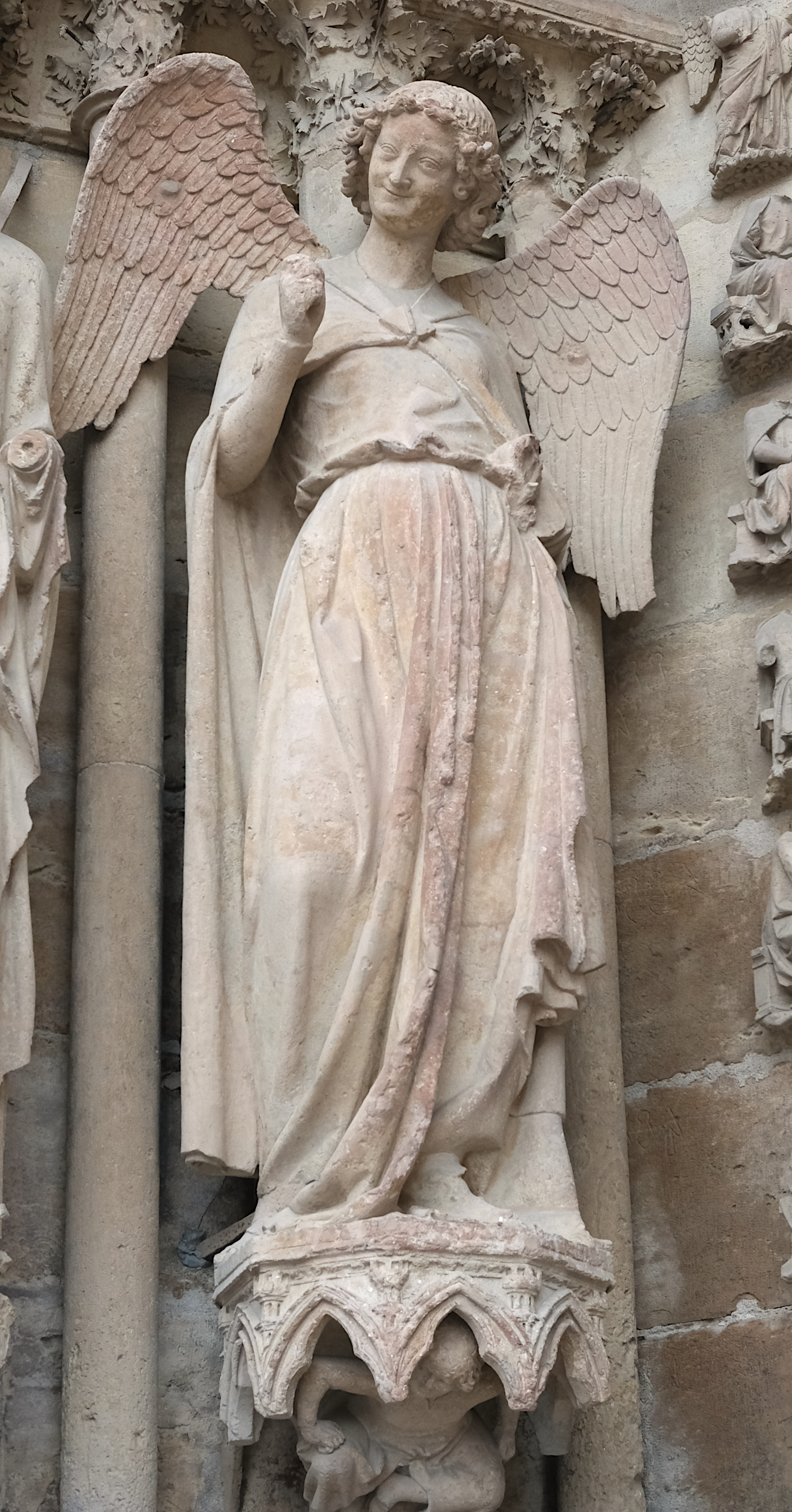 Cathédrale de Reims (ange du portail gauche).